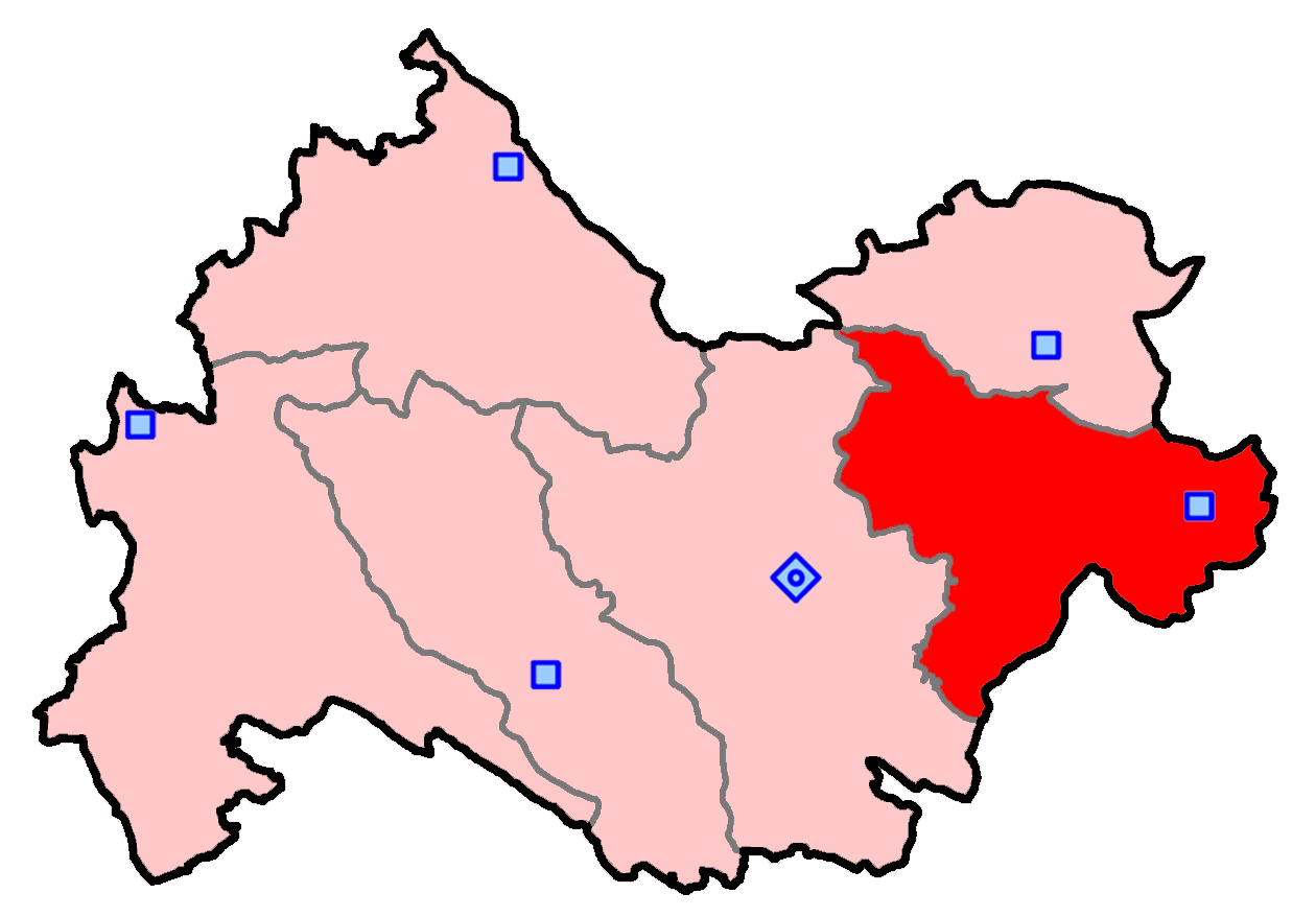 حوزه‌ کنگاور برای انتخابات مجلس شورای اسلامی